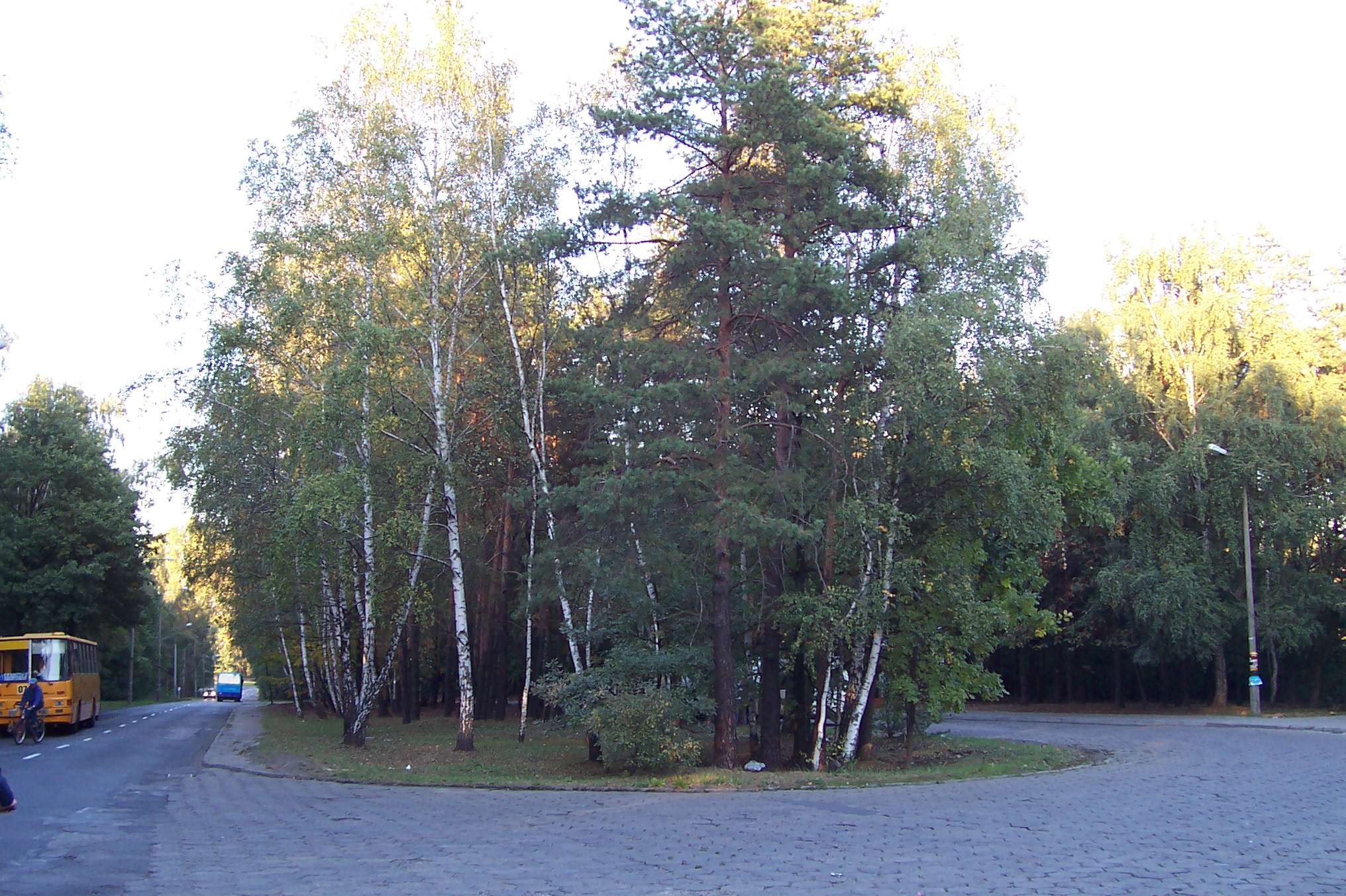 Katowice-Ligota pętla autobusowa.